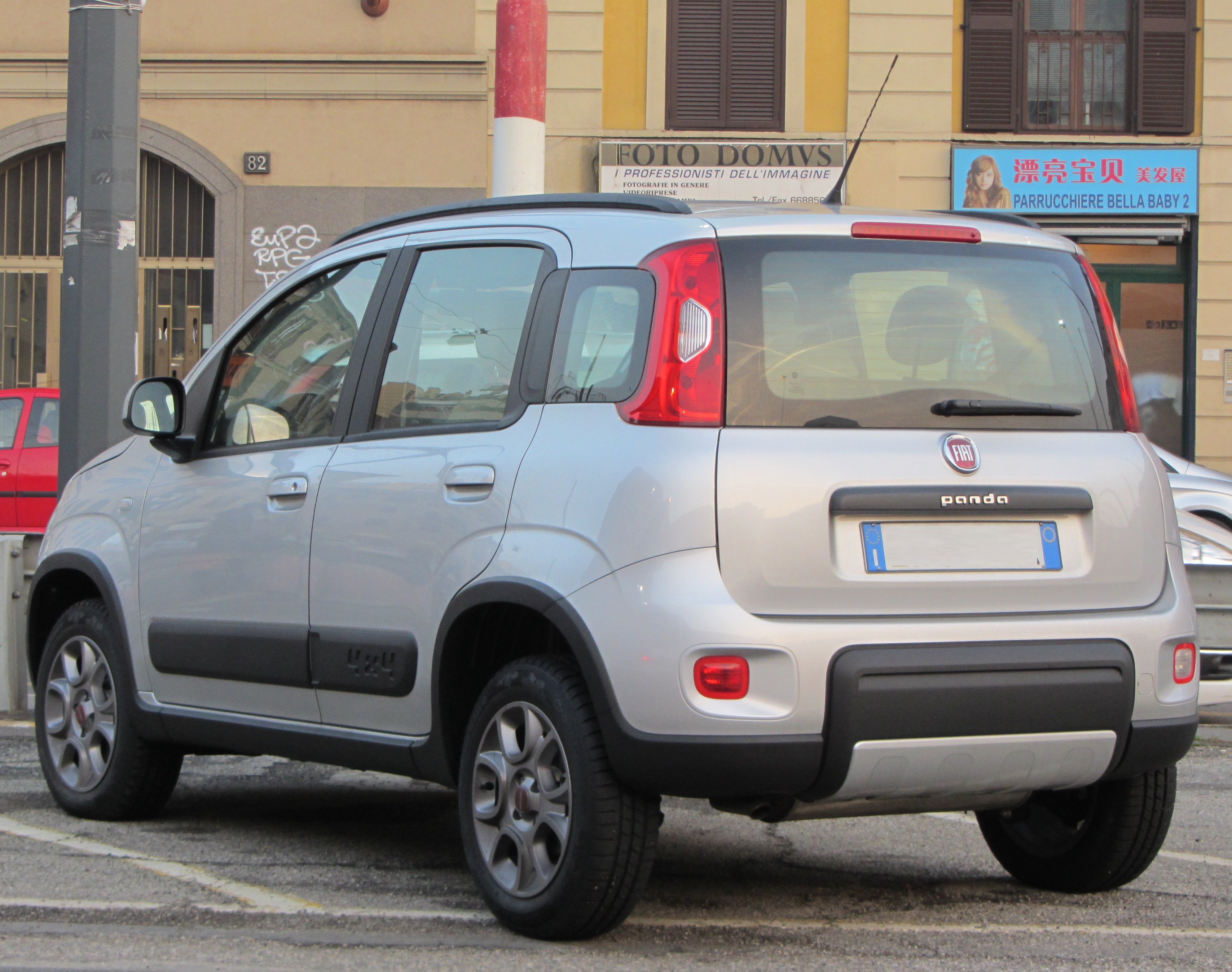 Una Fiat Panda terza serie (MK3 - 2011) 4x4 a Milano